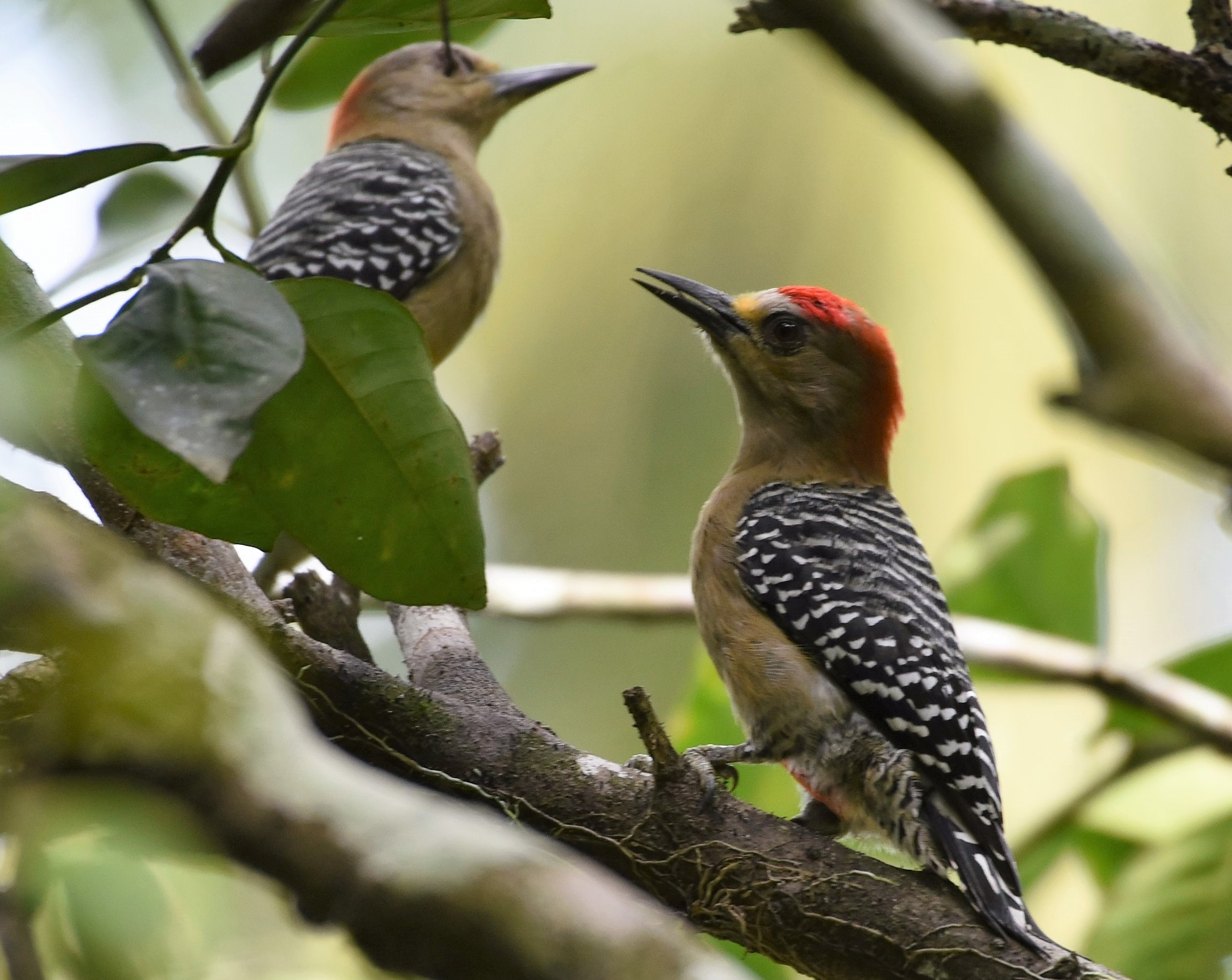 Rotkappenspecht (Melanerpes rubricapillus rubricapillus)